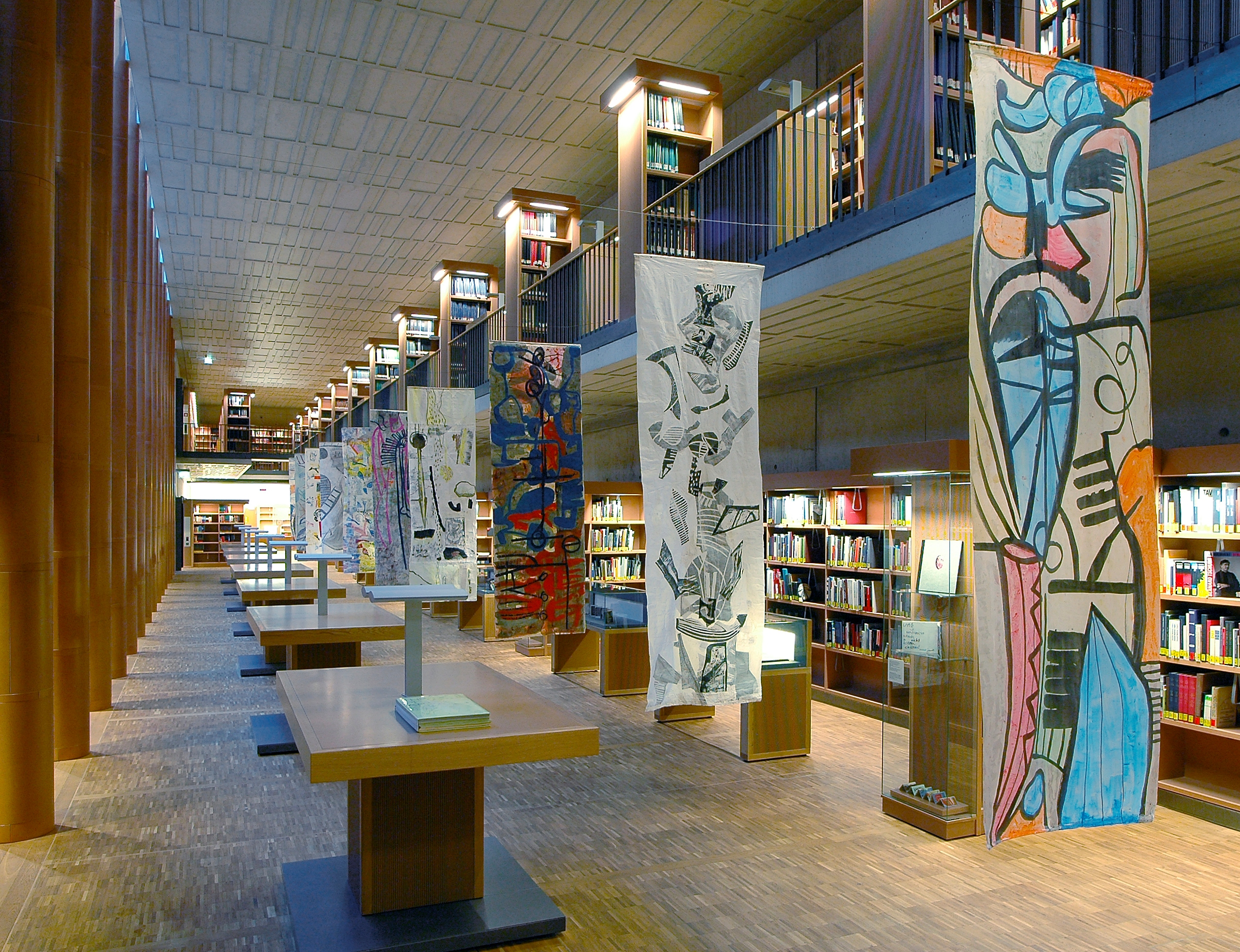 mit Bildern von Veit Hoffmann Foto: SLUB Dresden / Henrik Ahlers